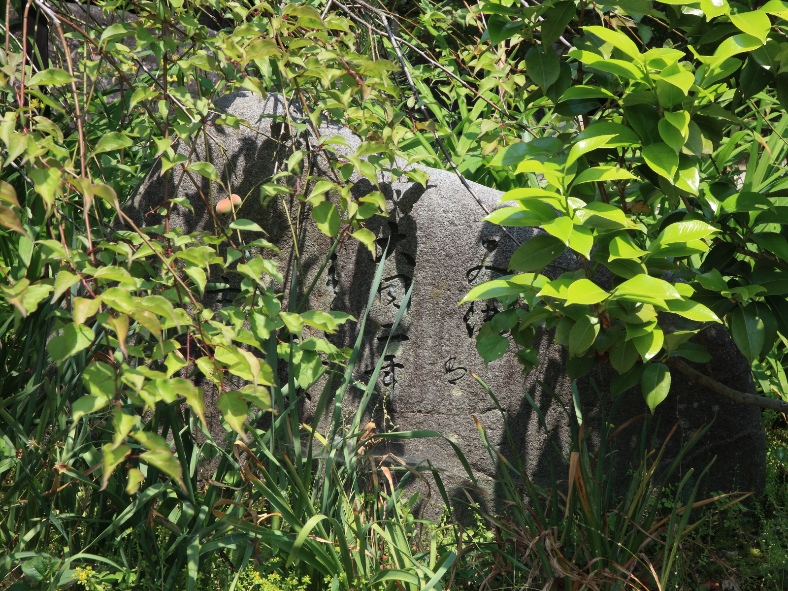 二村山峠にある井上士朗の句碑（豊明市、2012年）